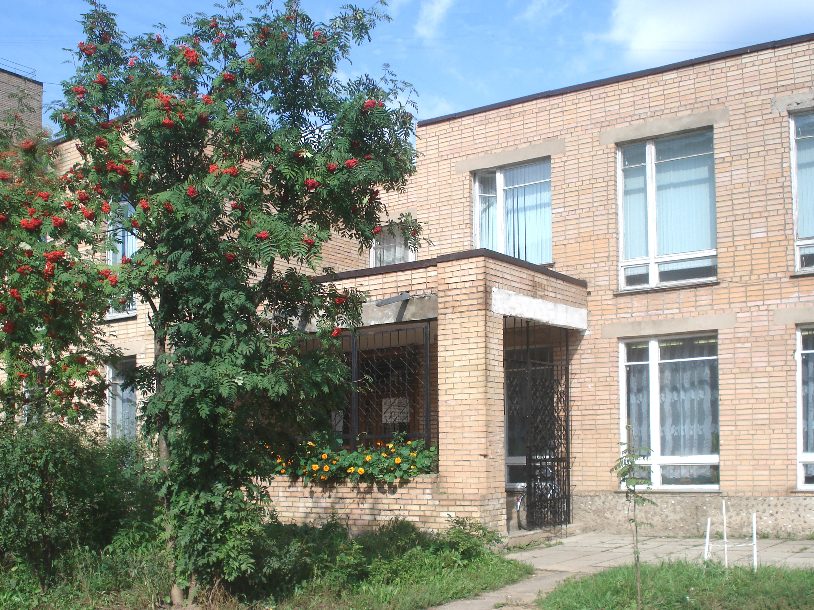 Здание, в котором находится выставочный зал Картинной галереи г. Красноармейска